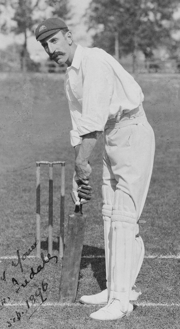 Frank Iredale